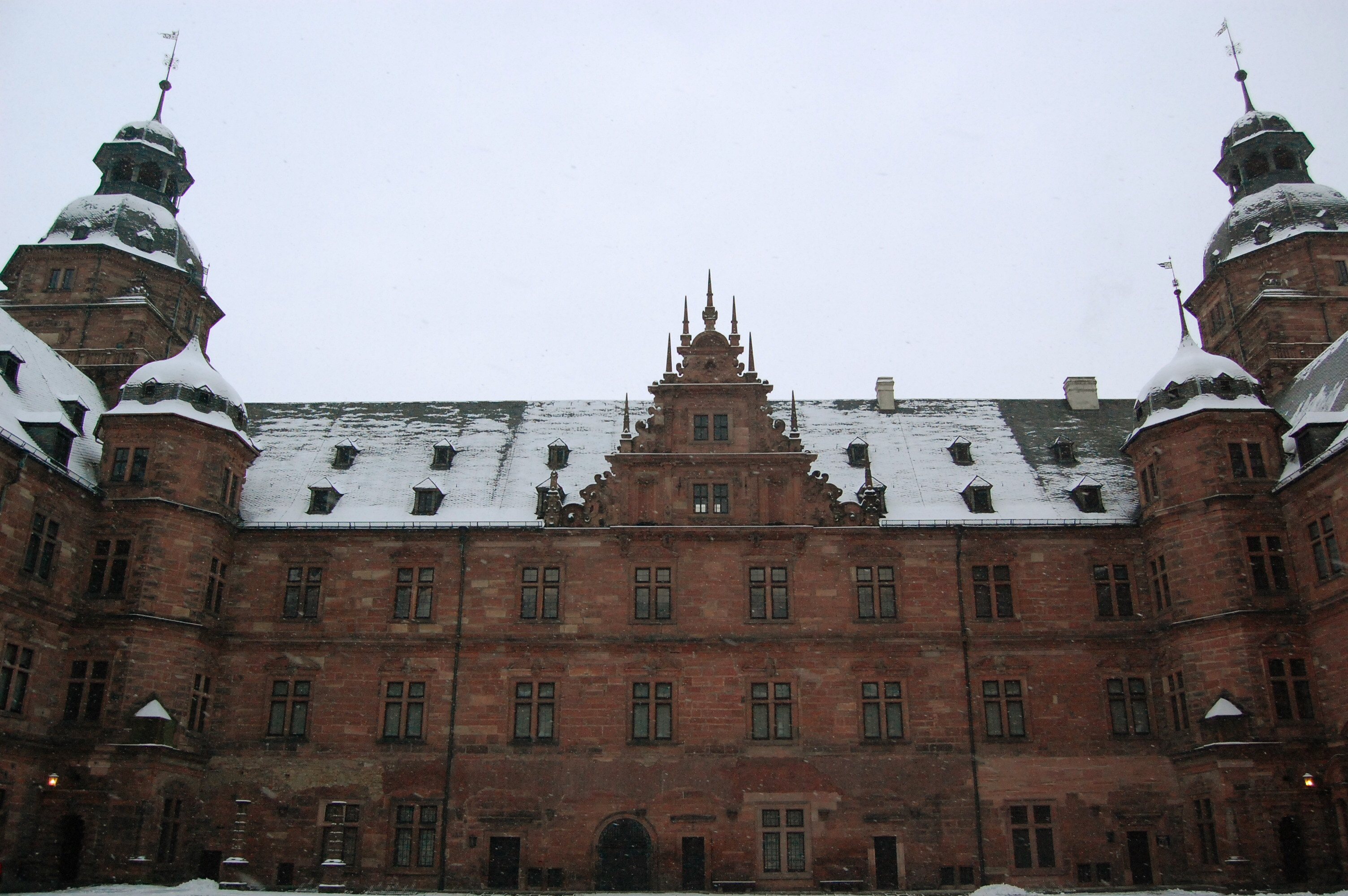 Zamek Johannisburg - widok dziedzińca